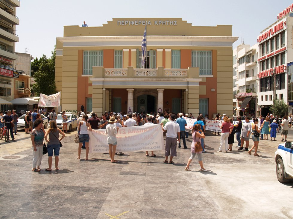 Πολίτες διαδηλώνουν στο Ηράκλειο για την αναβάθμιση του νοσοκομείου της Ιεράπετρας, στις 20/7/2011.